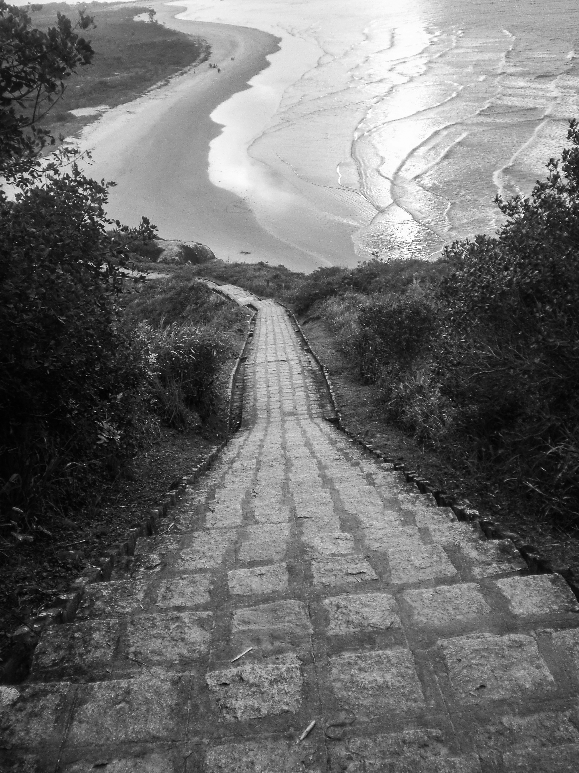 Vista do topo da escadaria que leva até o farol da Ilha do Mel.